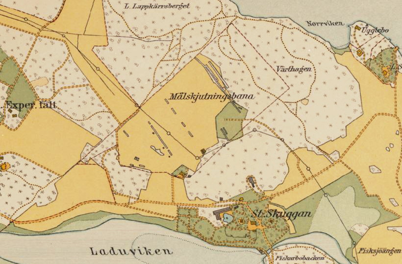 Del av 1934 års karta över Stockholm med omgivningar visande Stora Skuggans skjutbana